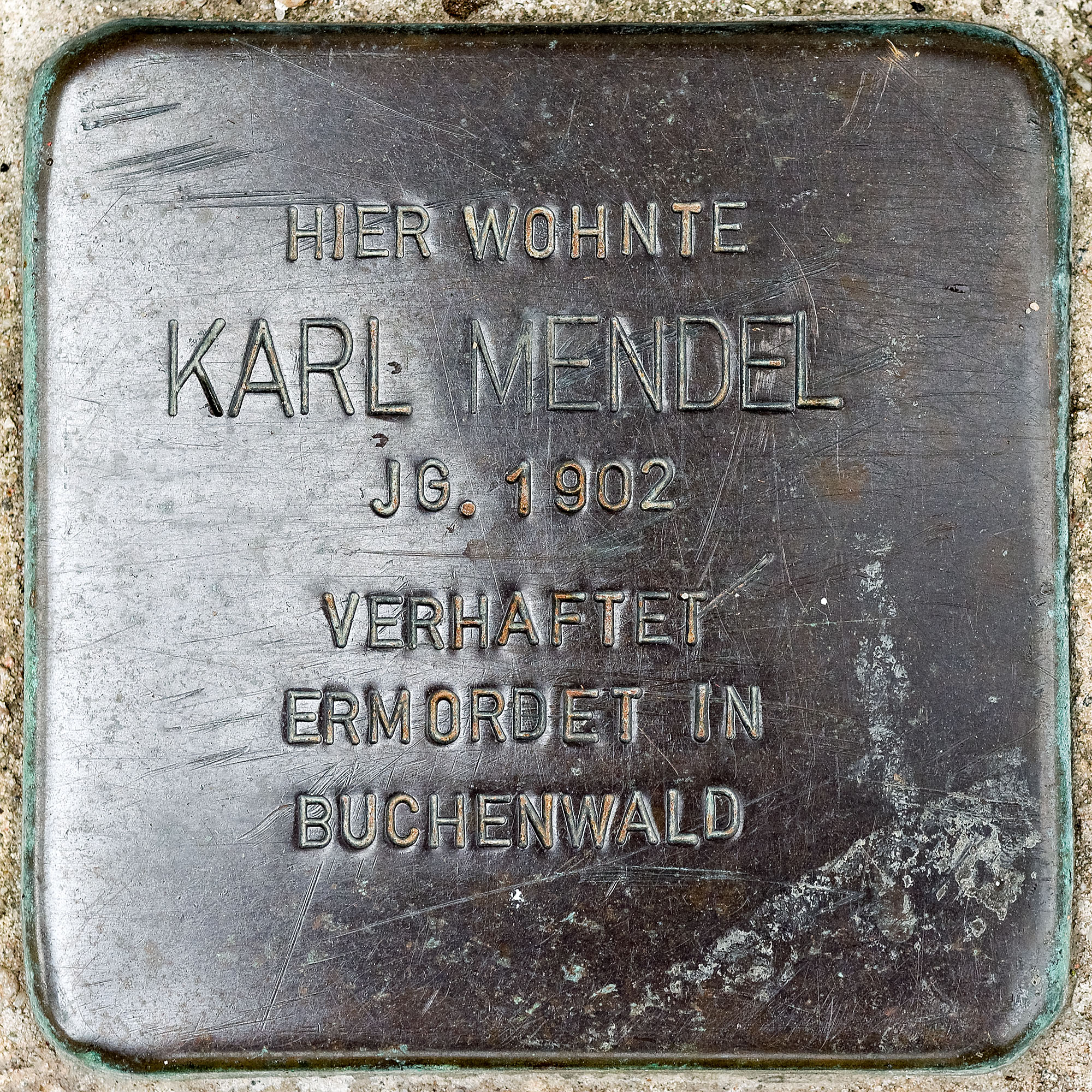 2017 07 16 Stolpersteine Kerken Mendel Karl